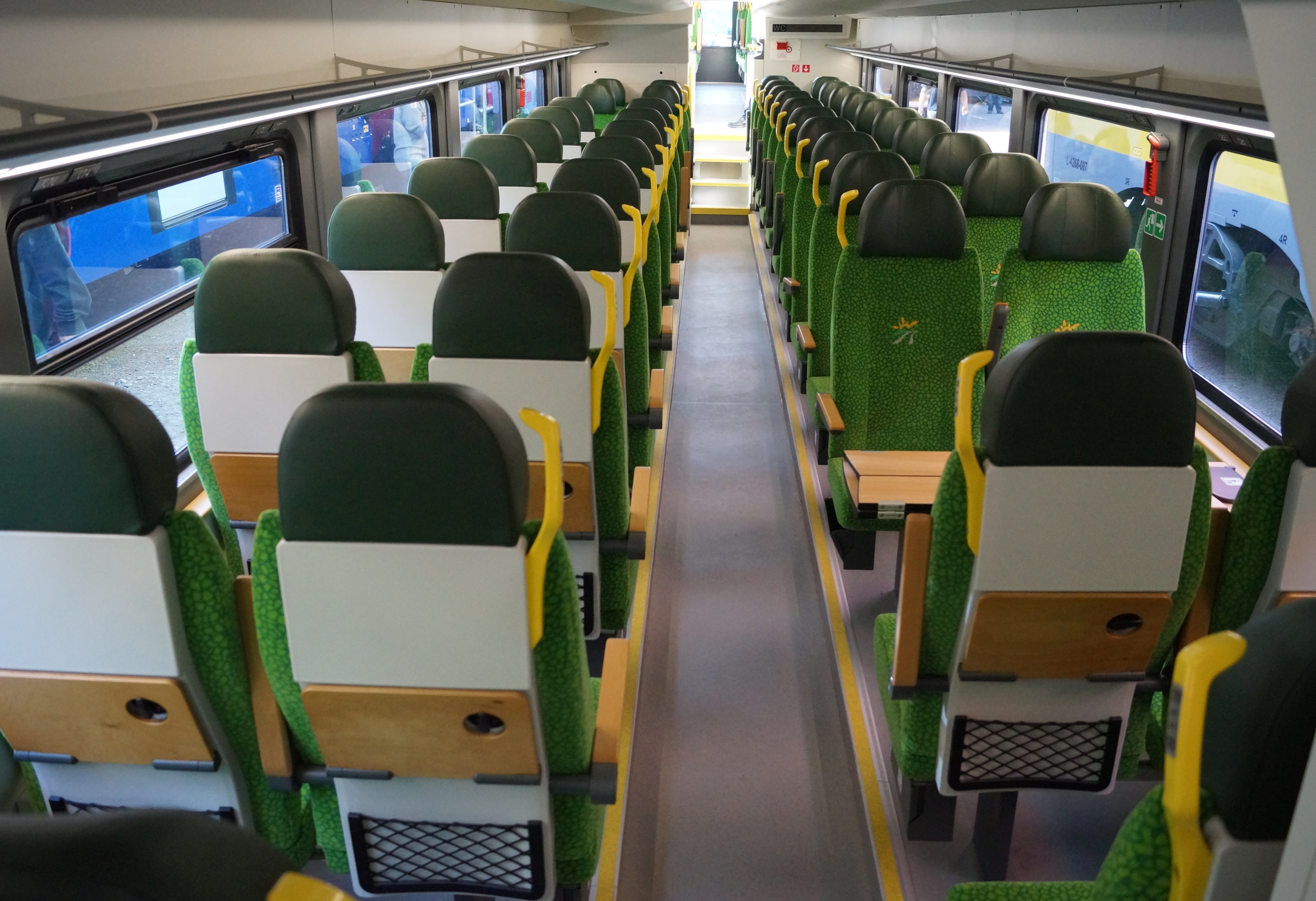 The making of this document was supported by Wikimedia Polska Association, within Wikigrant no. WG 2015-34. English | polski | +/− Dolny pokład wagonu typu 416B (Pesa Sundeck) w barwach Kolei Mazowieckich wystawianego na Targach Trako 2015